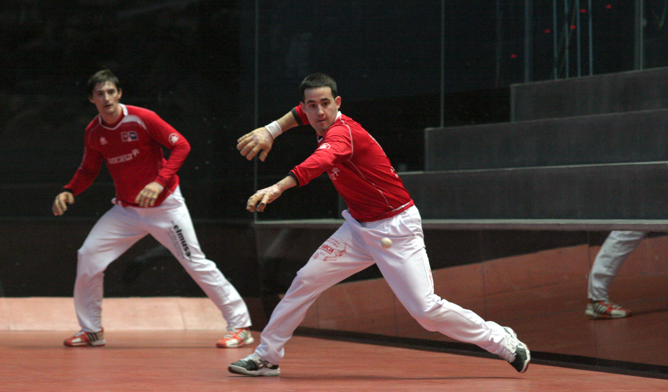 final circuit bancaixa 2012 2013 ciutat de la pilota